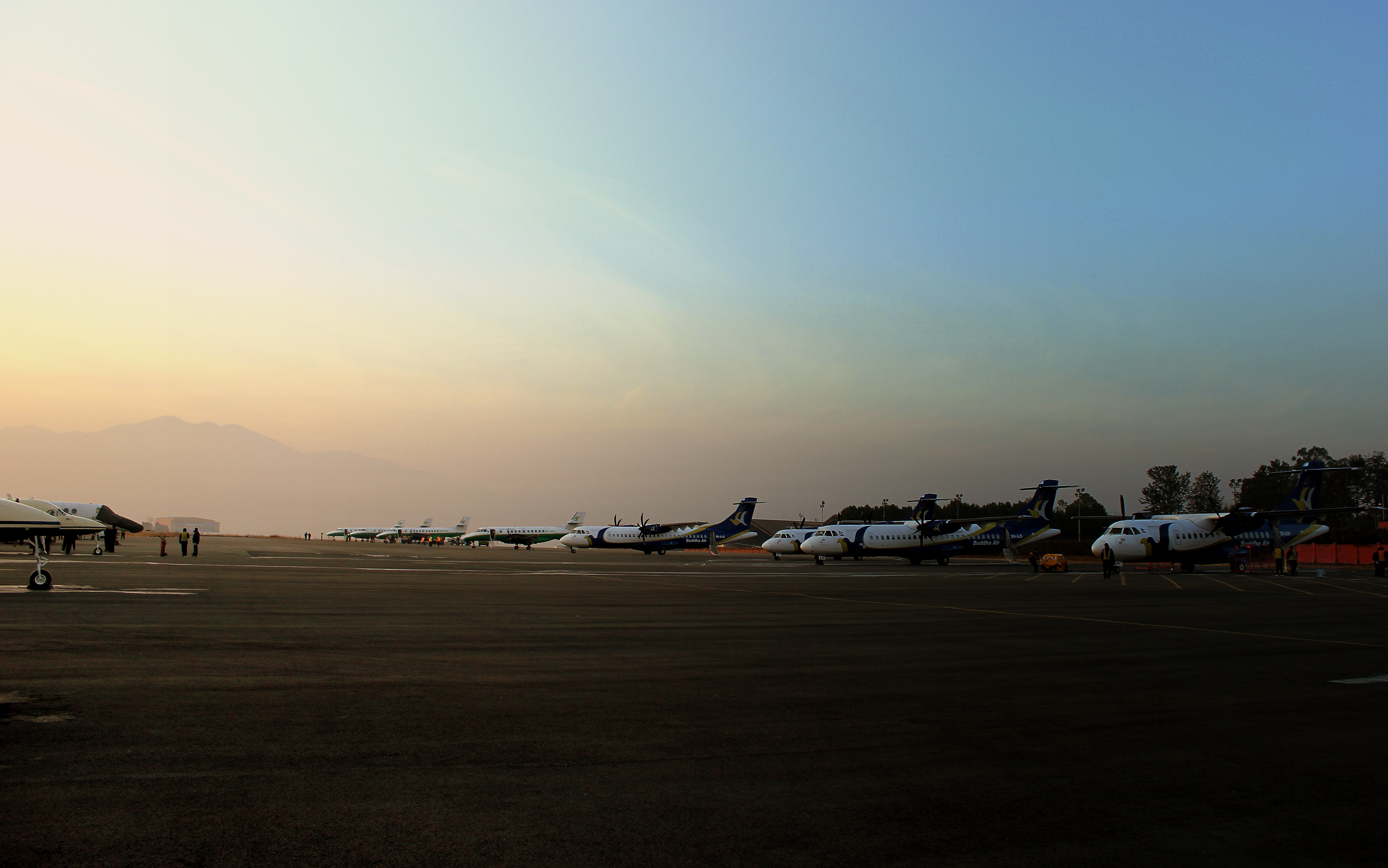 DOMESTIC RAMP AT TRIBHUVAN AIRPORT KATHMANDU NEPAL FEB 2013